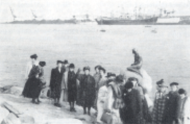 Göteborgs Kvinnliga Diskussionsklubbs resa till Köpenhamn hösten 1945